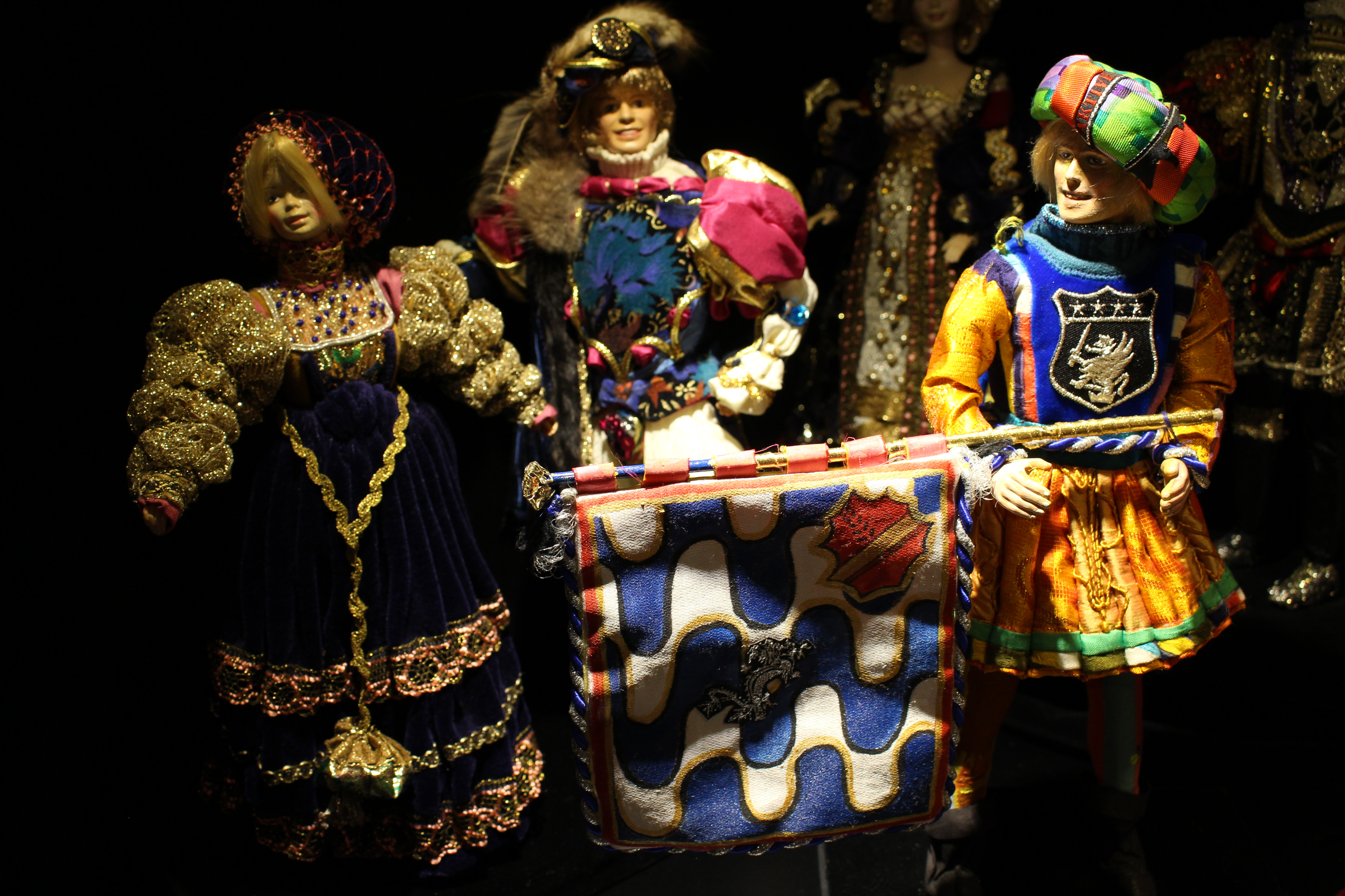 Die Ausstellung "Mode-Reigen durch fuenf Jahrhunderte" wurde von Ilse Wolf gefertigt. Urheberrecht bei Ilse Wolf. Bilddatei von Katja Morrison The Exhibition "Mode-Reigen durch fuenf Jahrhunderte" has been made by Ilse Wolf, all rights reserved. Picture by Katja Morrison